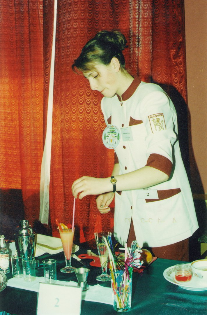 кулинарный фестиваль 2003г.